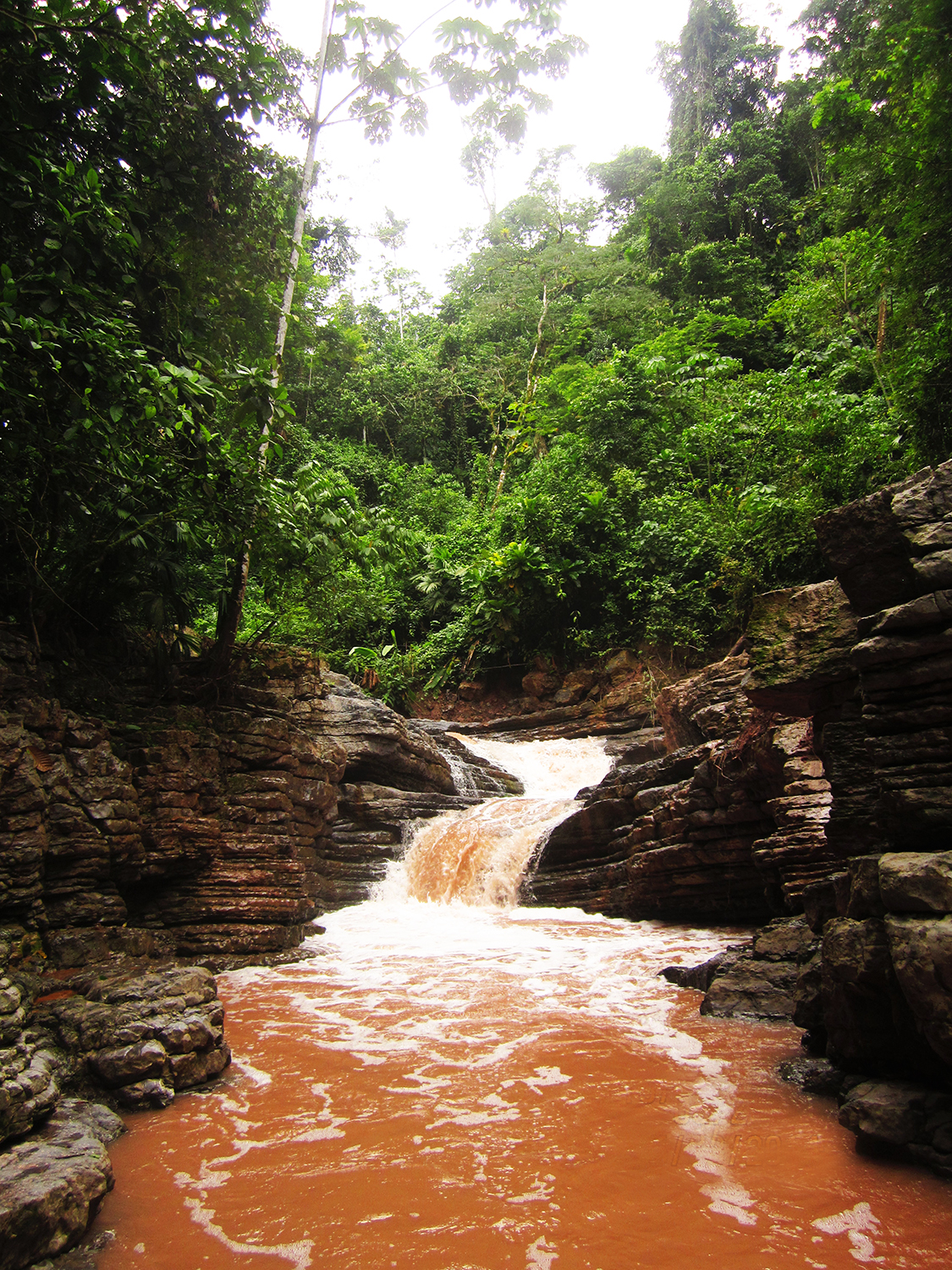 Cascada Escalera